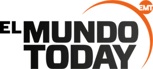 Logo de El Mundo Today